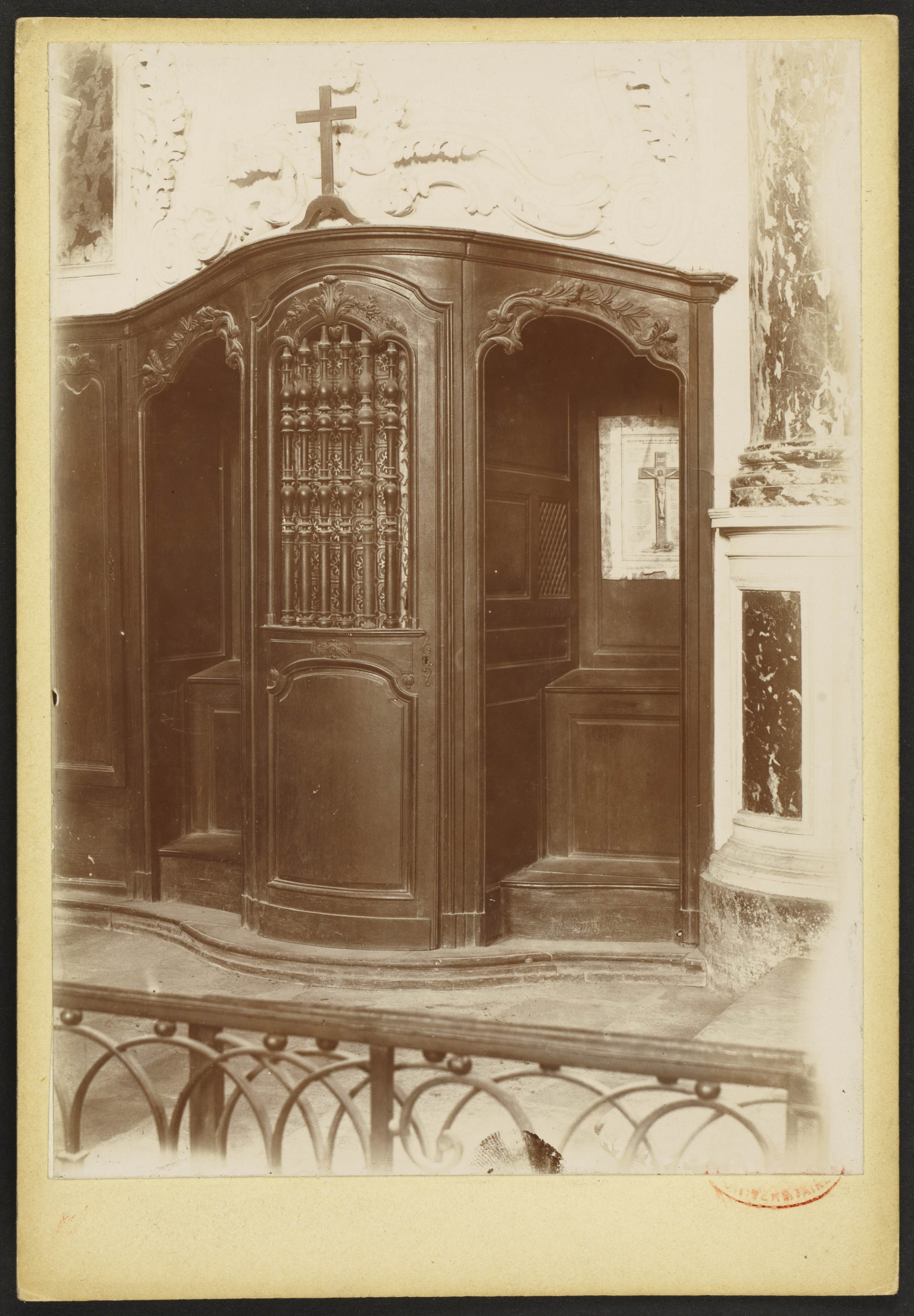 Église Saint-Vincent de Barsac; Confessionnal